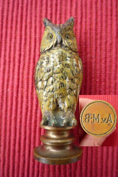 Petschaft mit Siegelbild